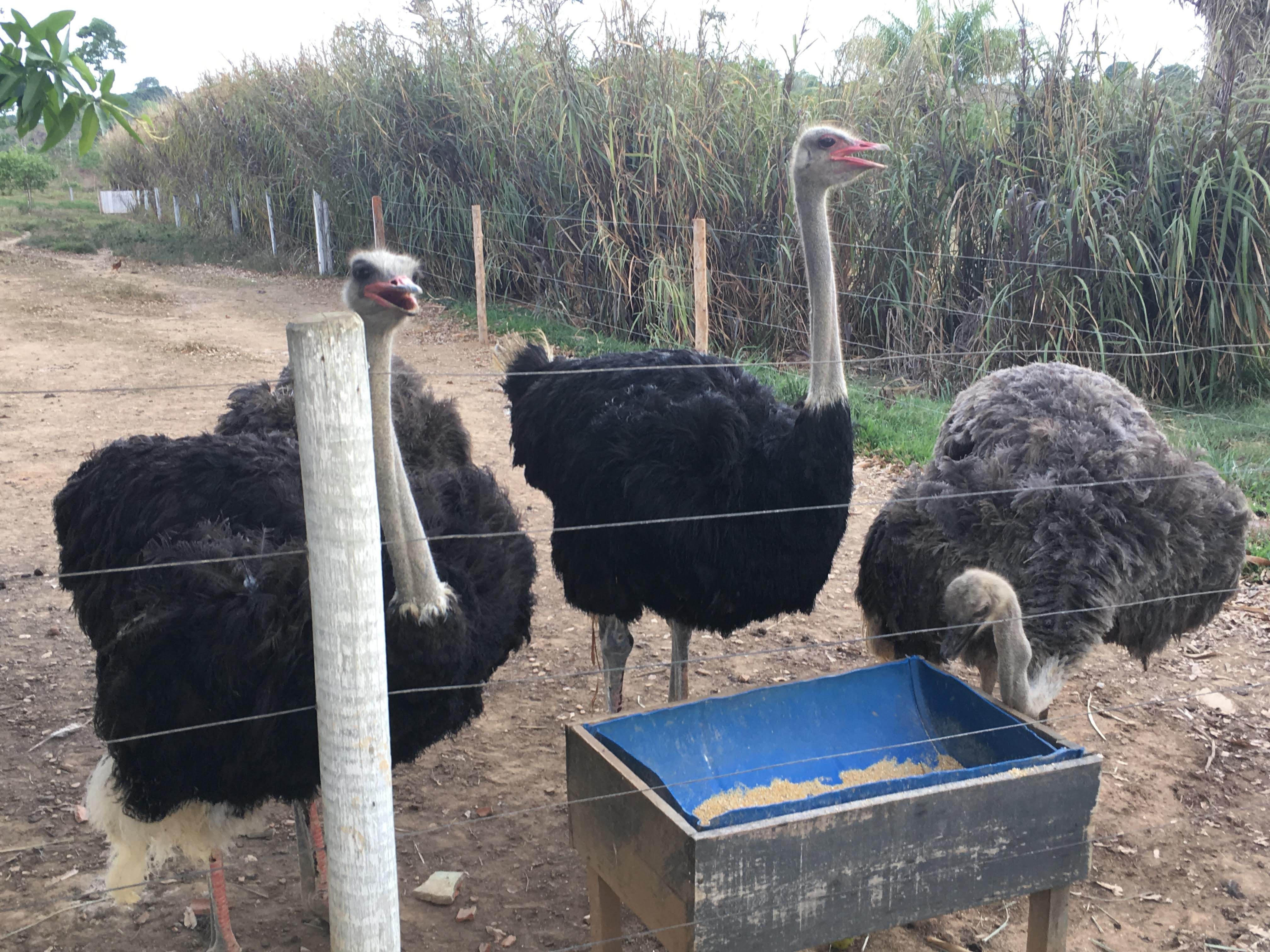 Três Avestruzes em um criadouro na Amazônia.